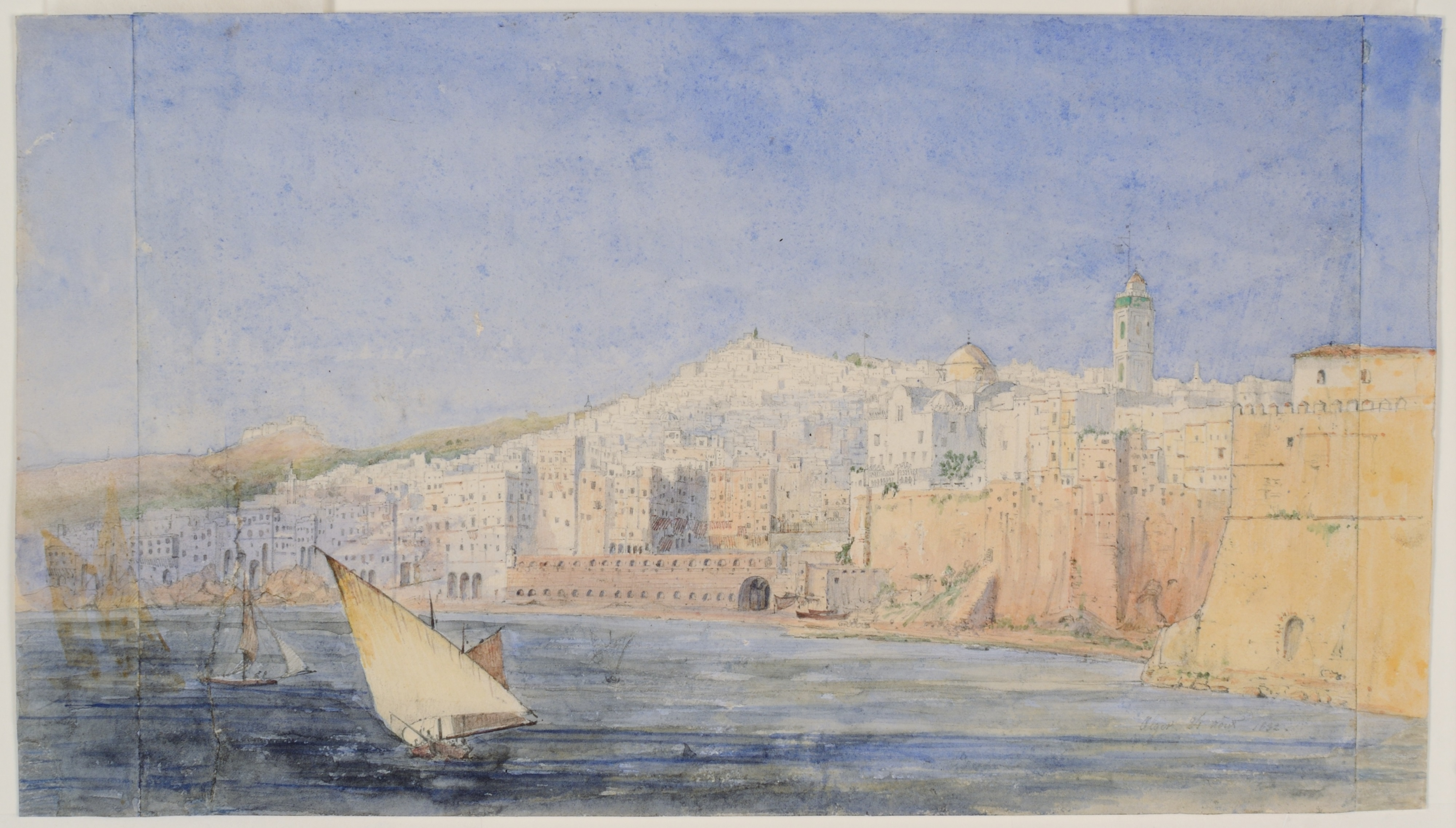 Alger, dessin au crayon et aquarelle sur papier, "24 août 1832", Musées de Langres©